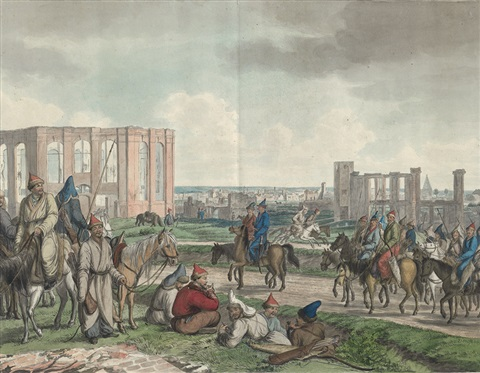 „Baschkiren bey Hamburgs zerstörten Vorstädten im Jahre 1814“, kolorierte Fassung einer Radierung von Christoph und Cornelius Suhr, vgl. Original in der SUB Hamburg unter im Hintergrund die Ruinen der zerstörten St. Pauli-Kirche und des ehemaligen Pest- und Krankenhofes